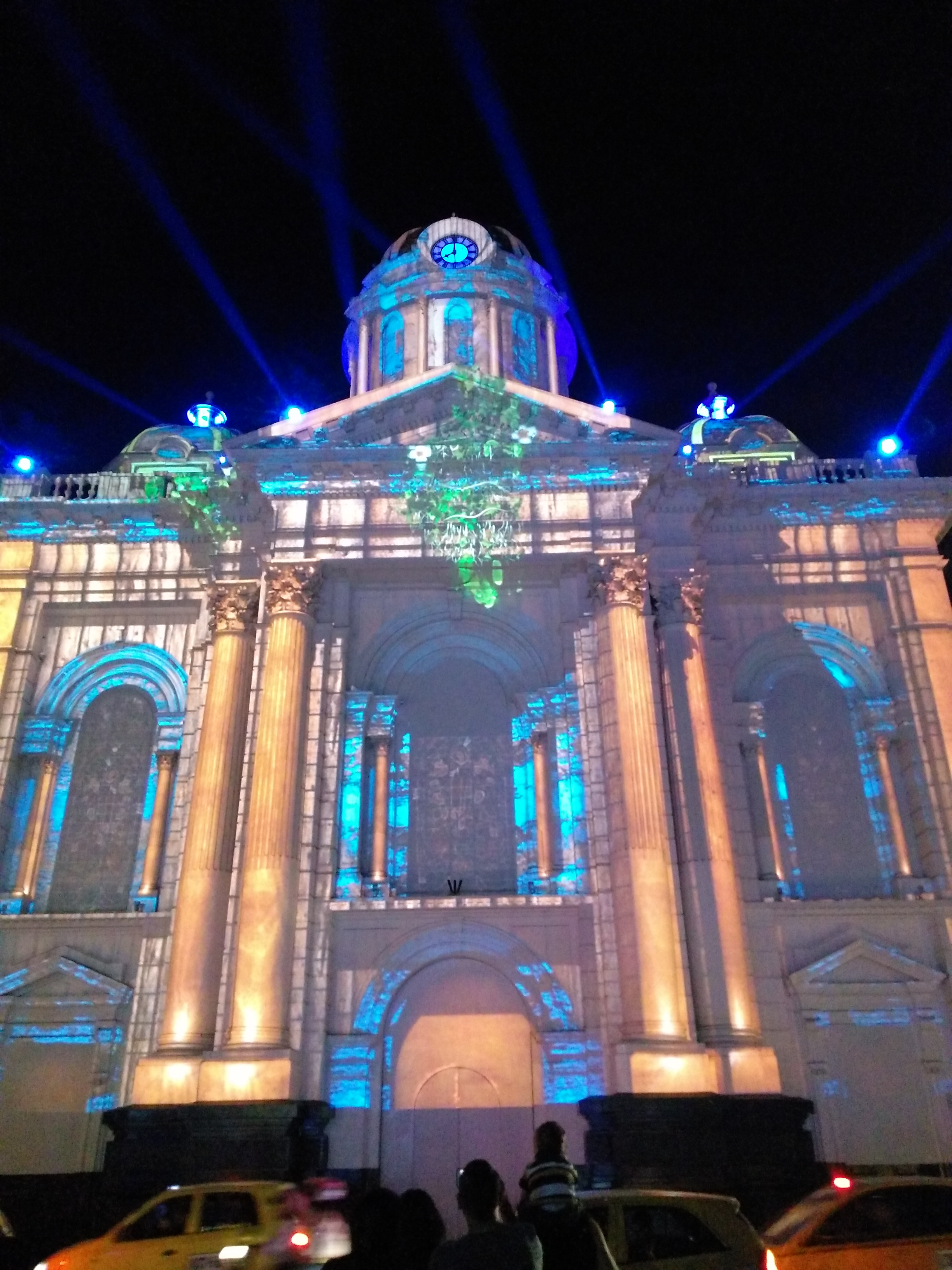 Esta fotografía fue tomada en el municipio colombiano con código 76001.